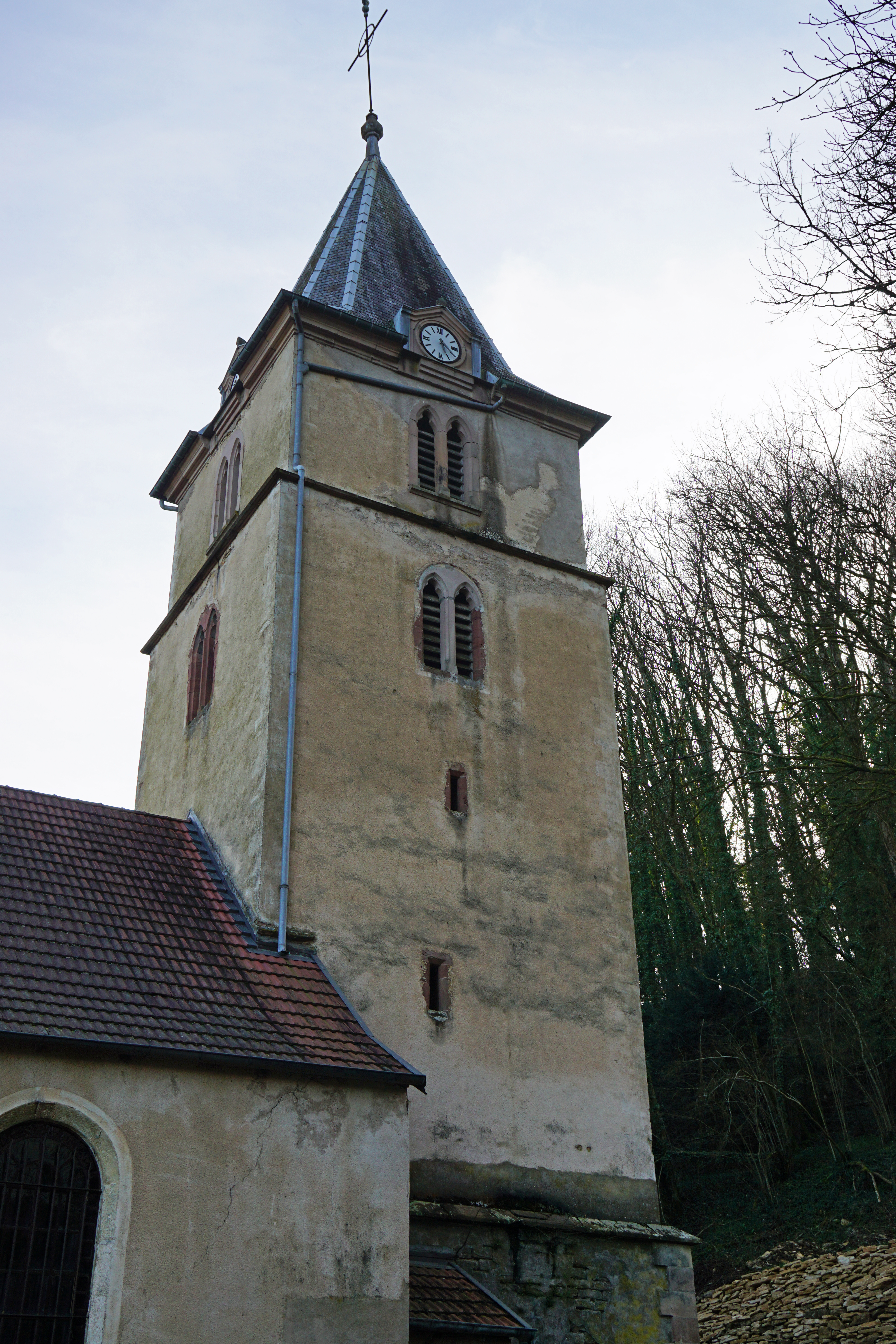 Gouhenans.